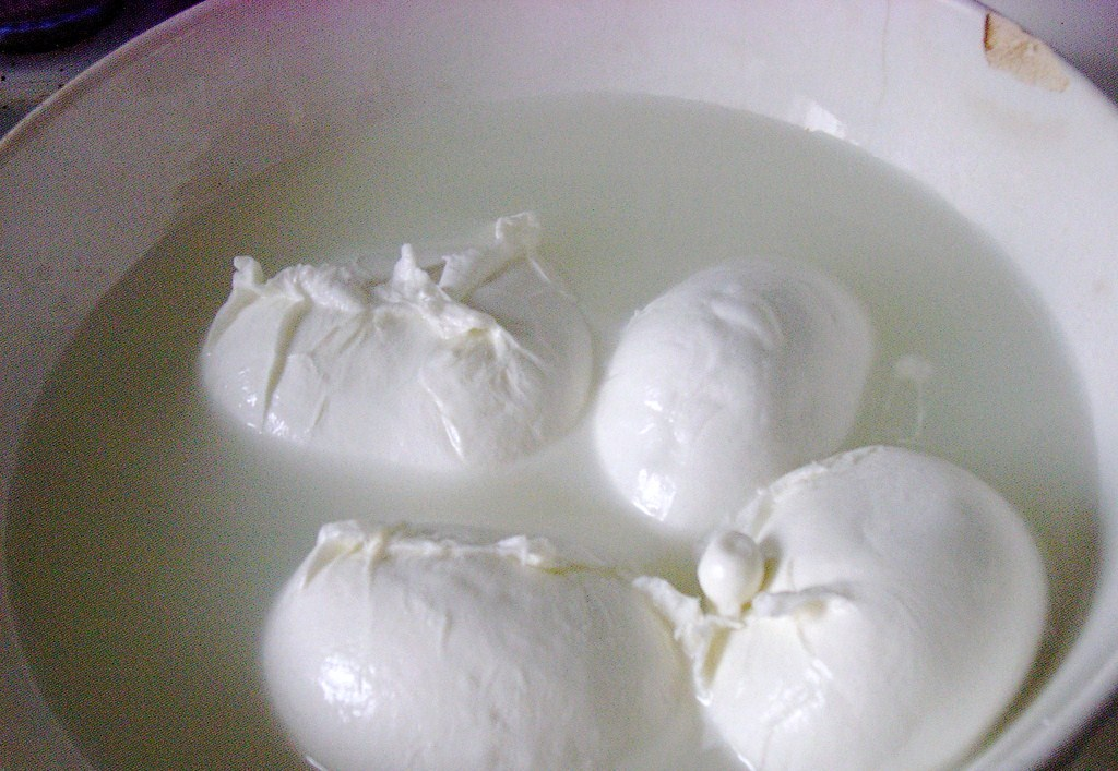 Mozzarella, Italian food.Mozzarelle